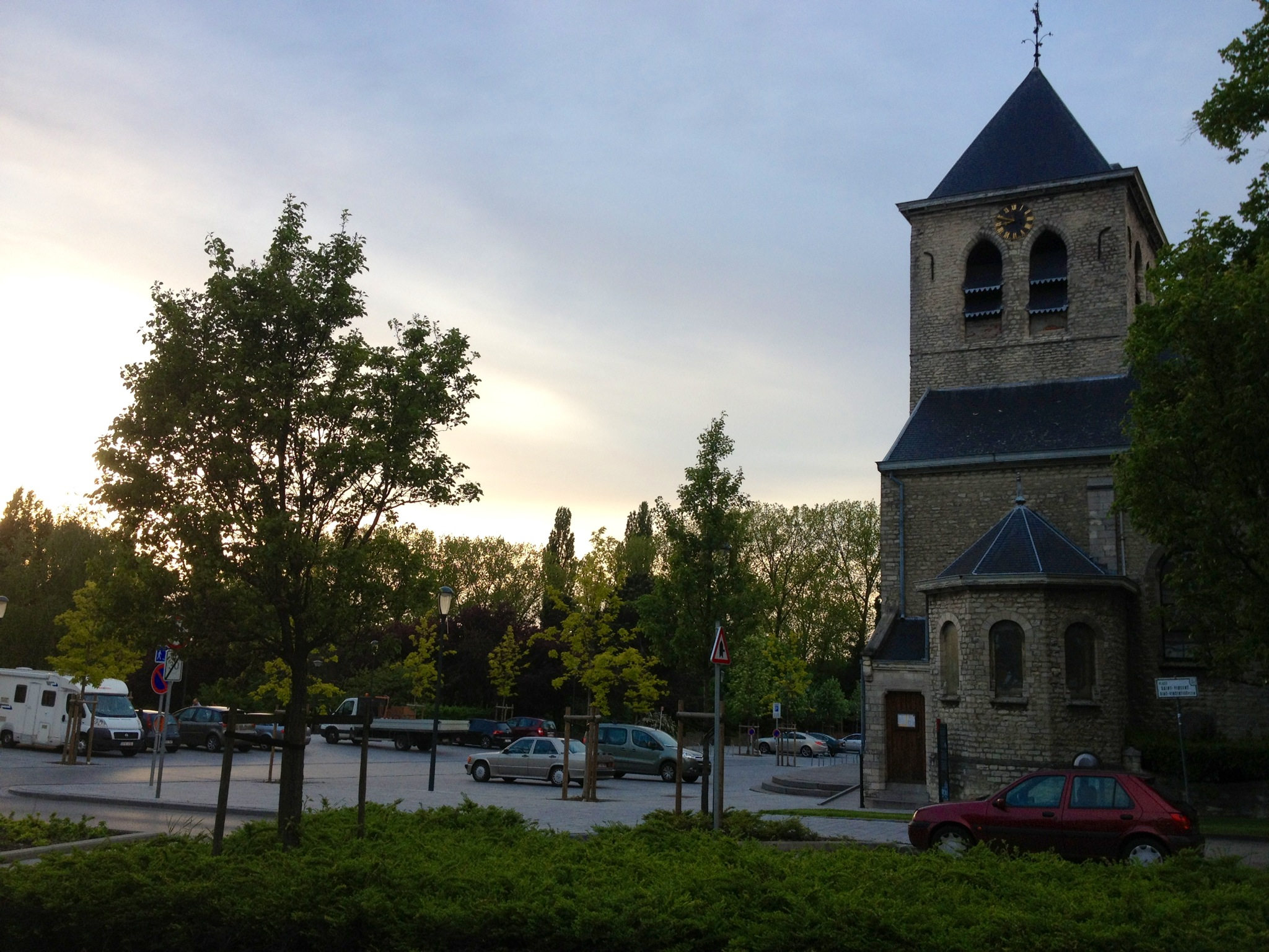 Kerk van Evere.